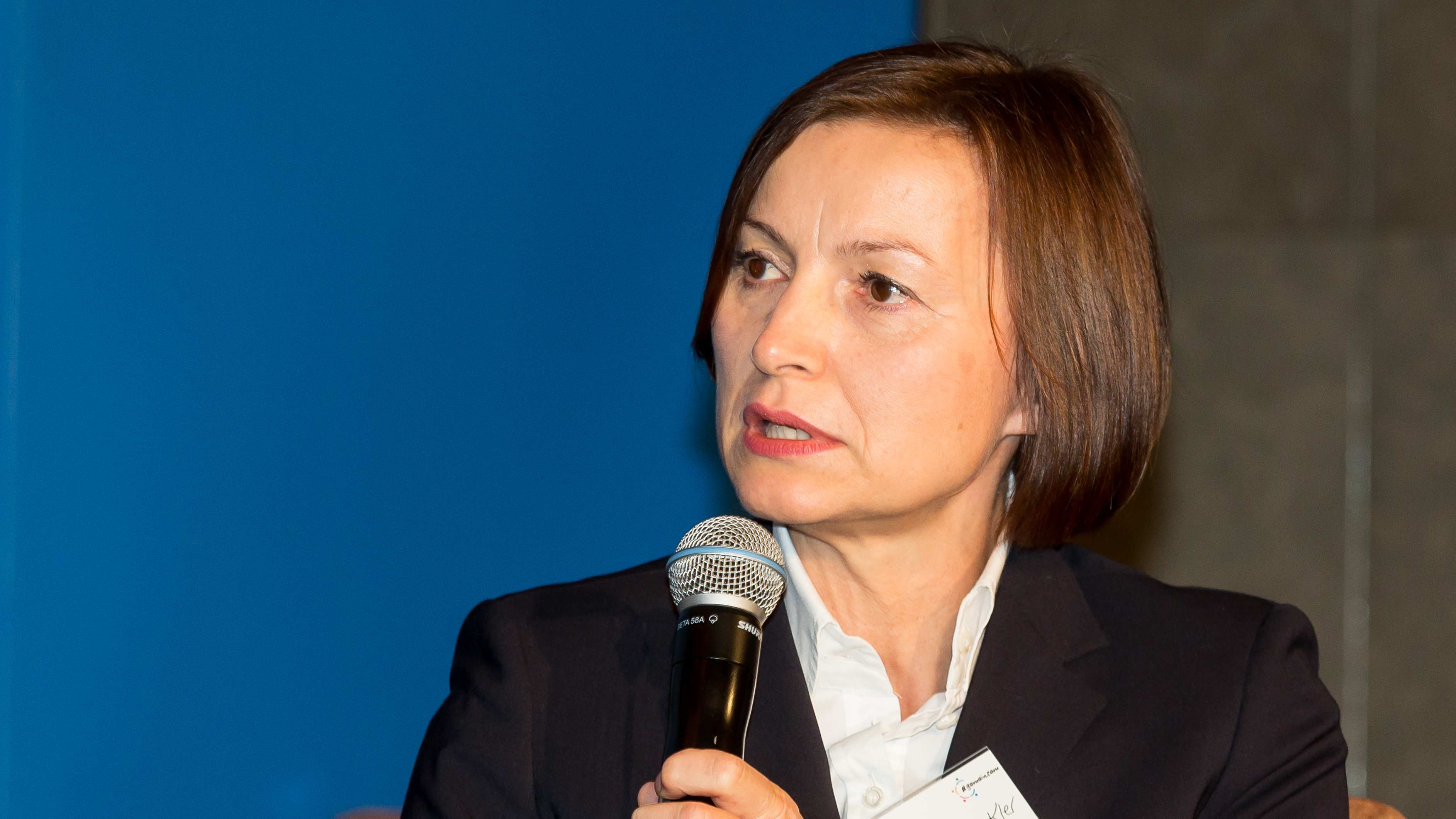 Werkstattreihe #gemeinsam für ein starkes Deutschland. Wie gelingt Integration? Wie hält eine Gesellschaft zusammen? Veranstalter: Bundesministerium des Innern. Veranstaltungsort: Alter Wartesaal Köln Foto: Prof. Dr. Marina Münkler, Technische Universität Dresden